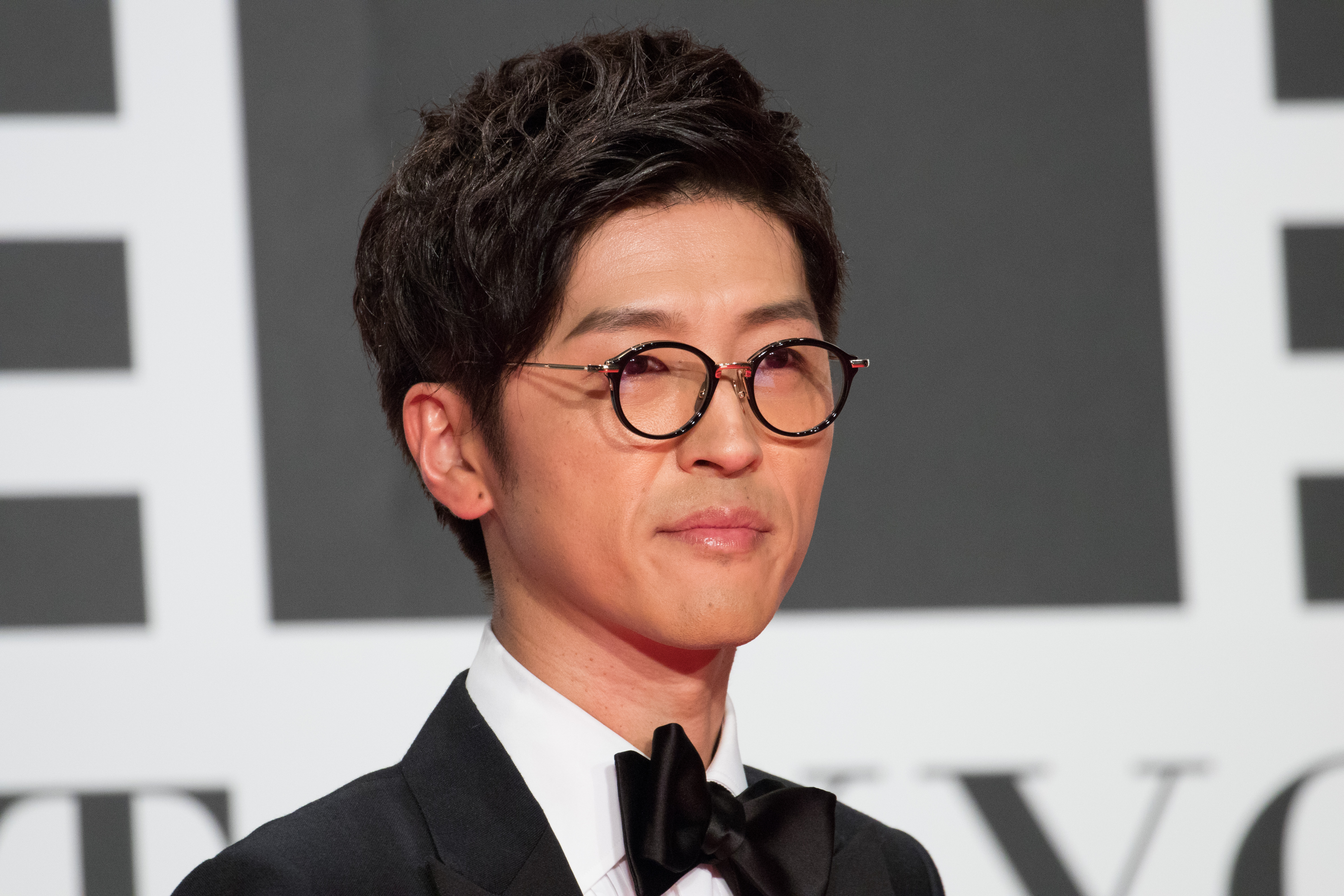 第29回 東京国際映画祭 オープニングセレモニー 櫻井孝宏 (虐殺器官)